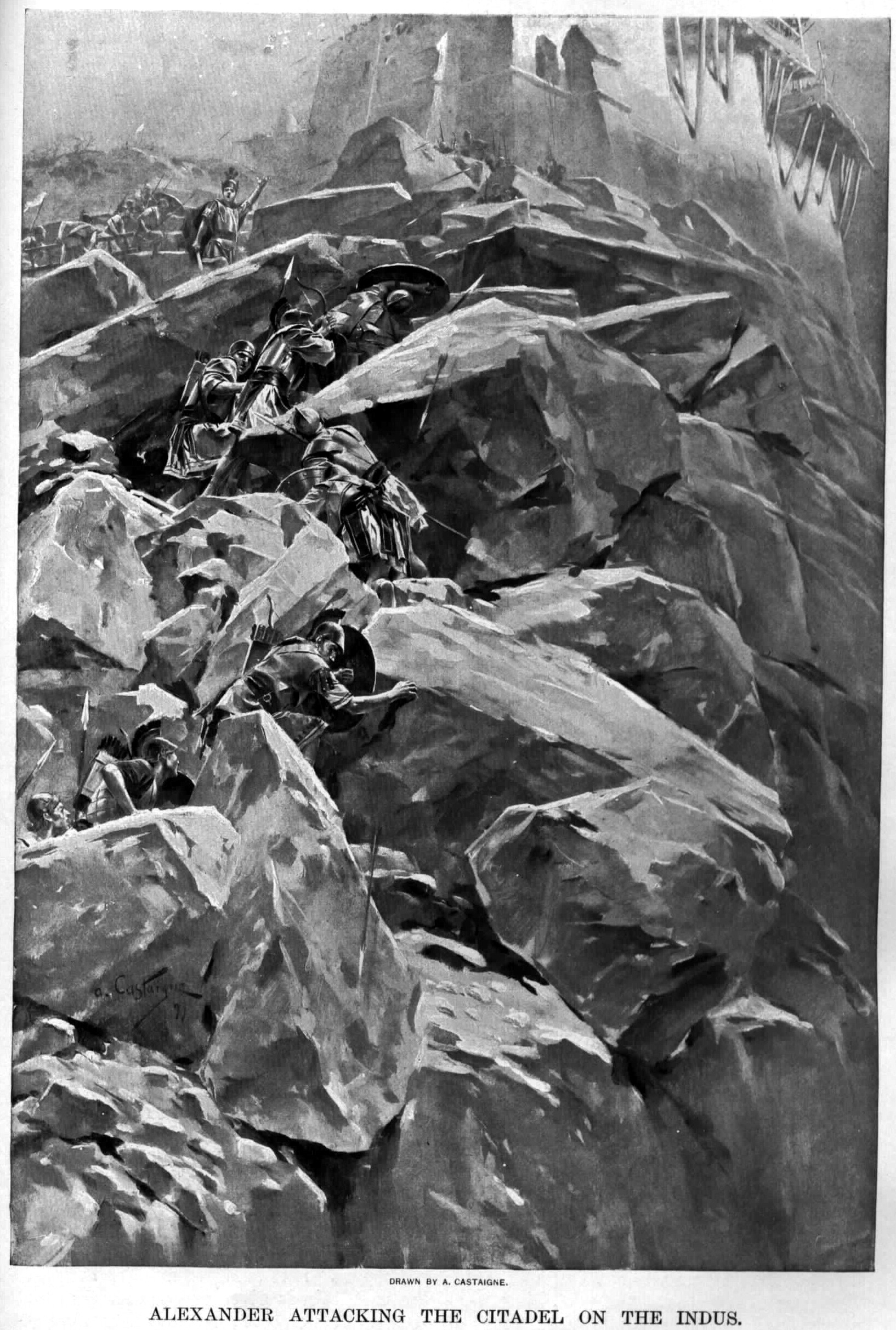 Alexander old drawings